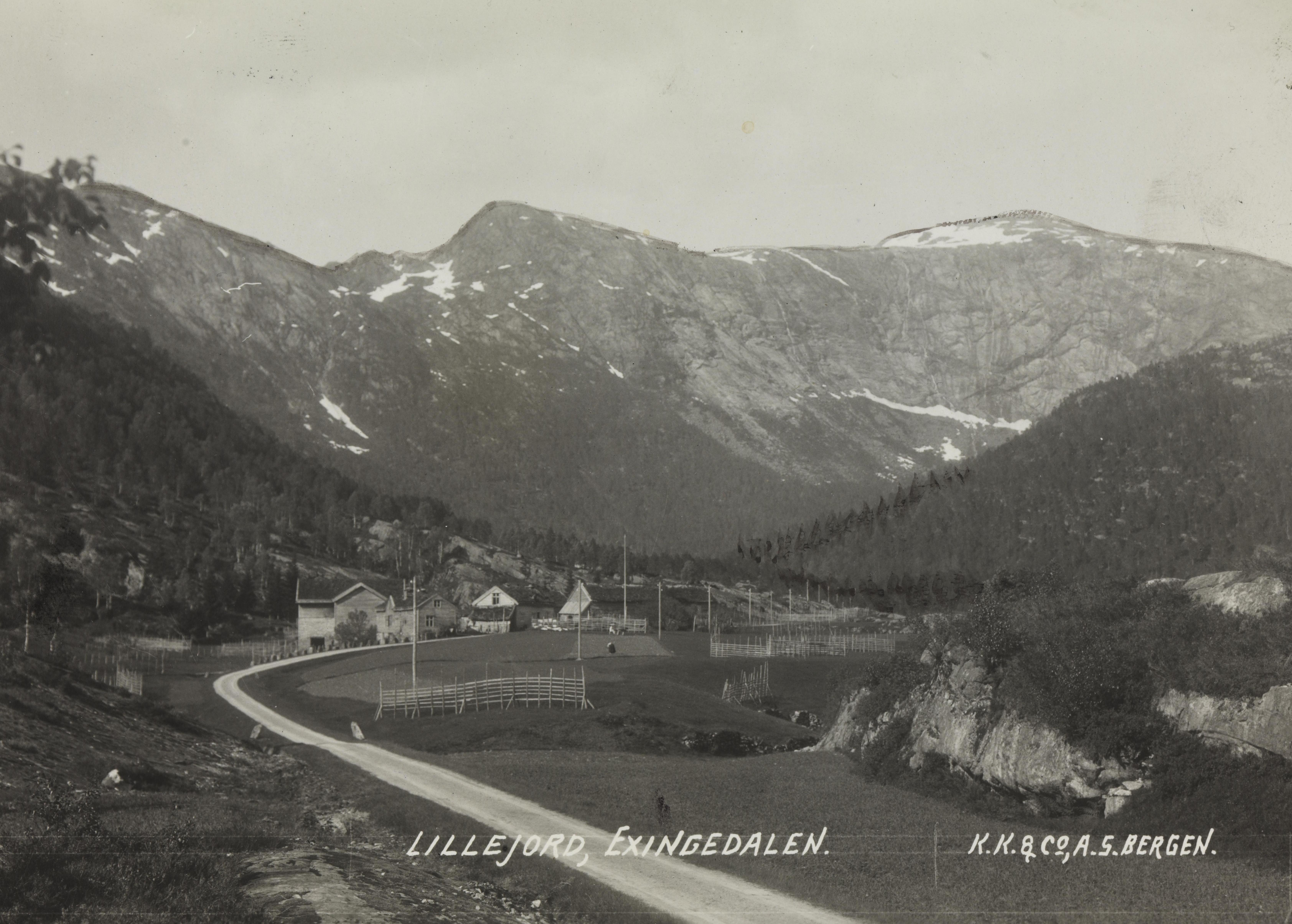 Bildet er hentet fra Nasjonalbibliotekets bildesamling Eksingedal, Vaksdal, Hordaland